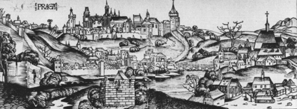 Praha kolem roku 1493